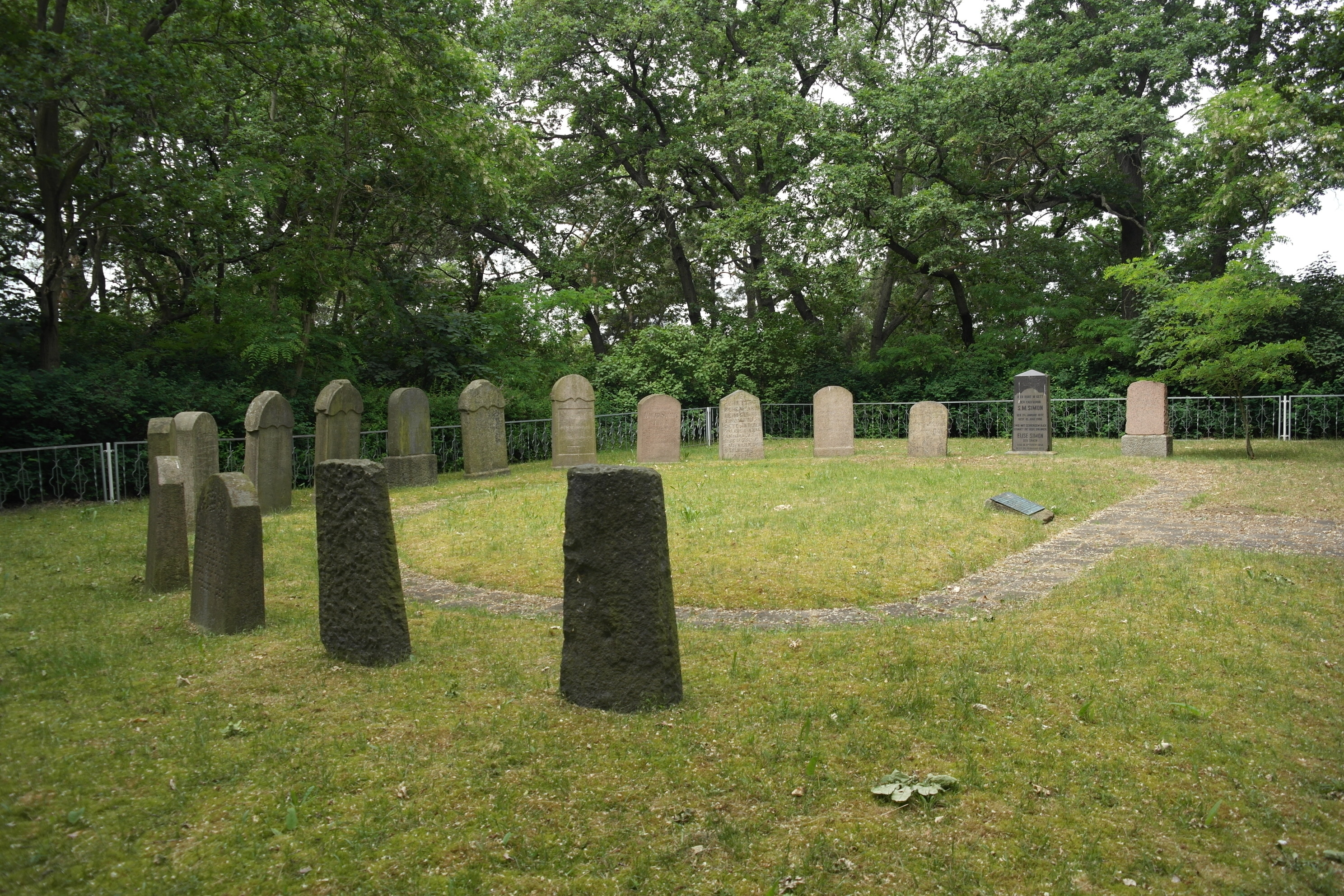 Jüdischer Friedhof Grabow, wiederaufgerstellte Steine